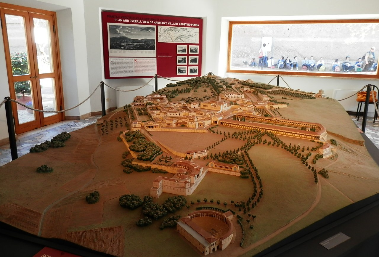 Hadrianus császár - 'Villa Adriana' grandiózus romkertje Tivoli városban